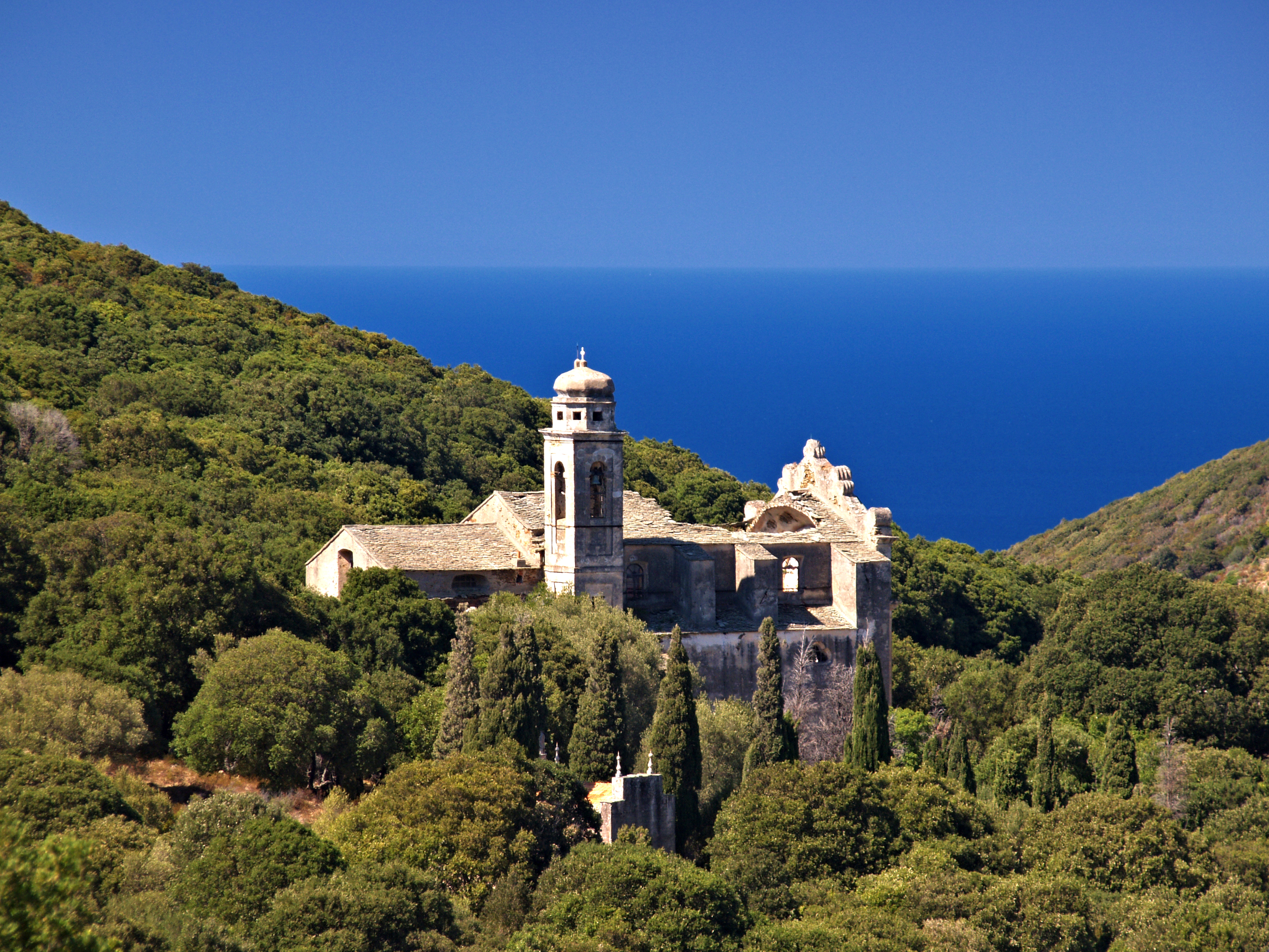 Ersa (Corsica) - Église Sant'Andrea ruinée jouxtant l'ancienne confrérie Santa Croce, l'actuelle paroisse.